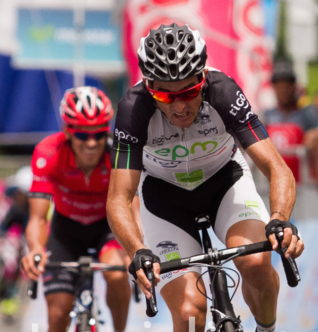 Eta9. Vuelta a Colombia 2015 Martes 11 de agosto de 2015. Cartago - Alto del Boquerón (157Kms)